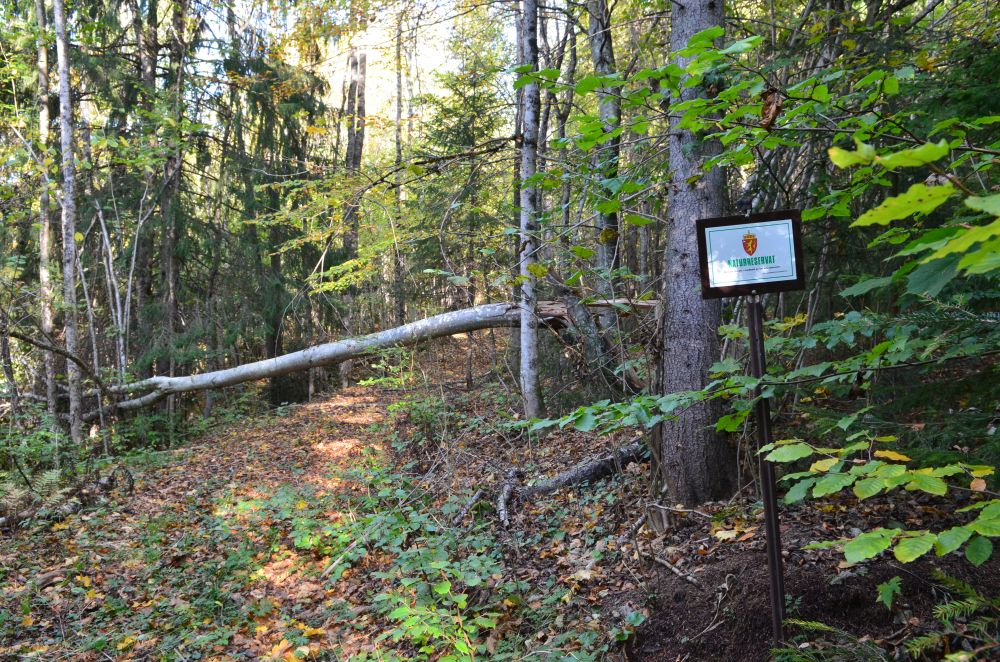 Reservatgrensen i sørøst inviterer til en frodig og rik edelløvskog.